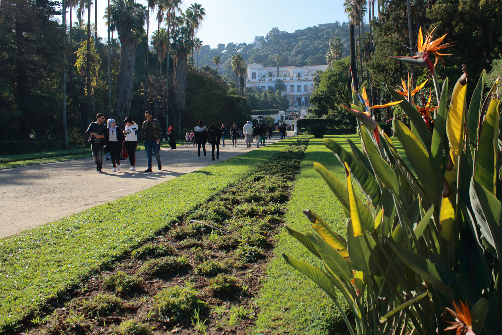 Jardin essai Hamma à Alger